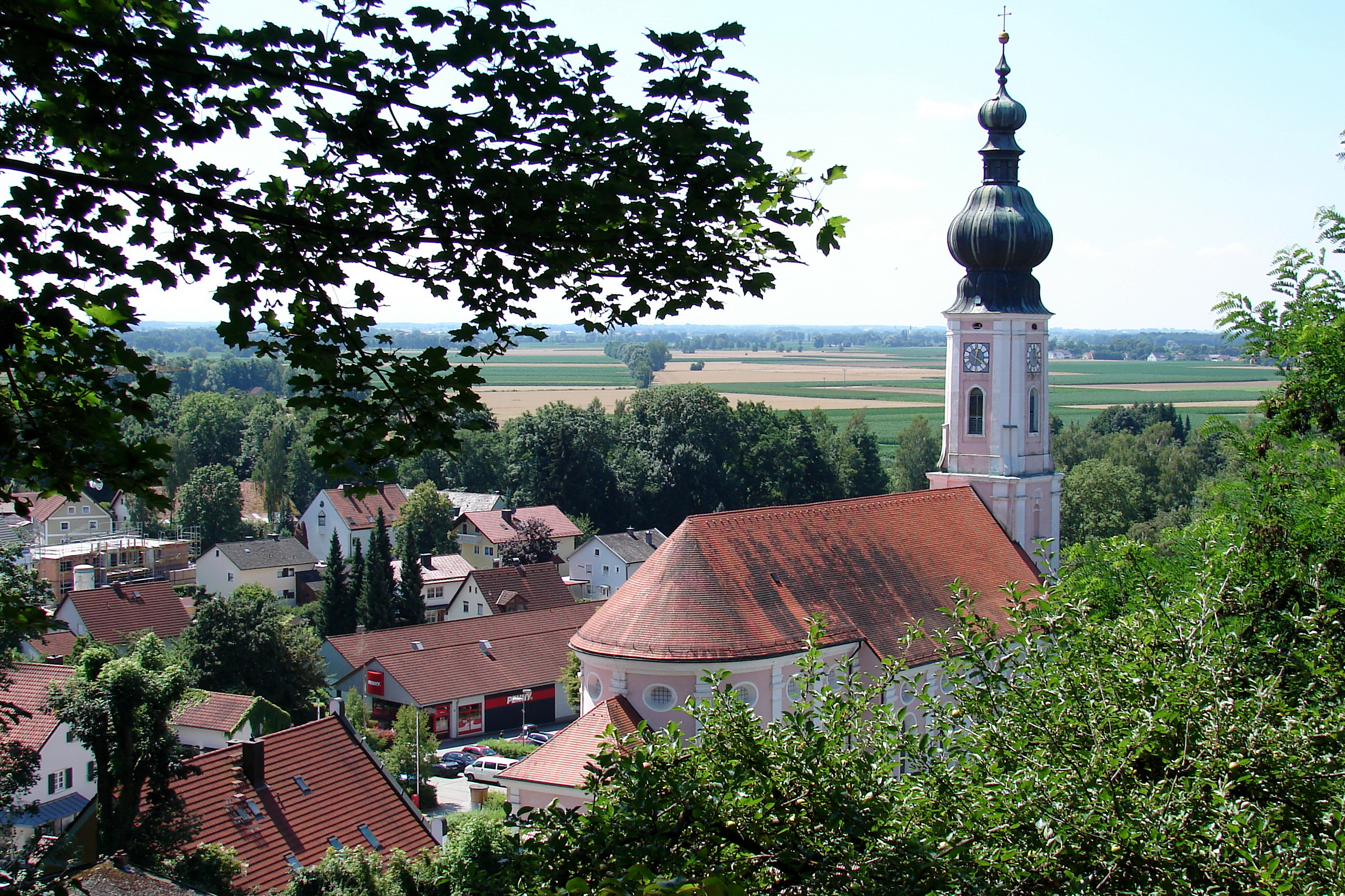 Wartenberg (Oberbayern) ist ein Markt im oberbayerischen Landkreis Erding.